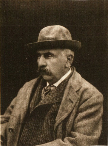 Fotografia di Gaetano Savini